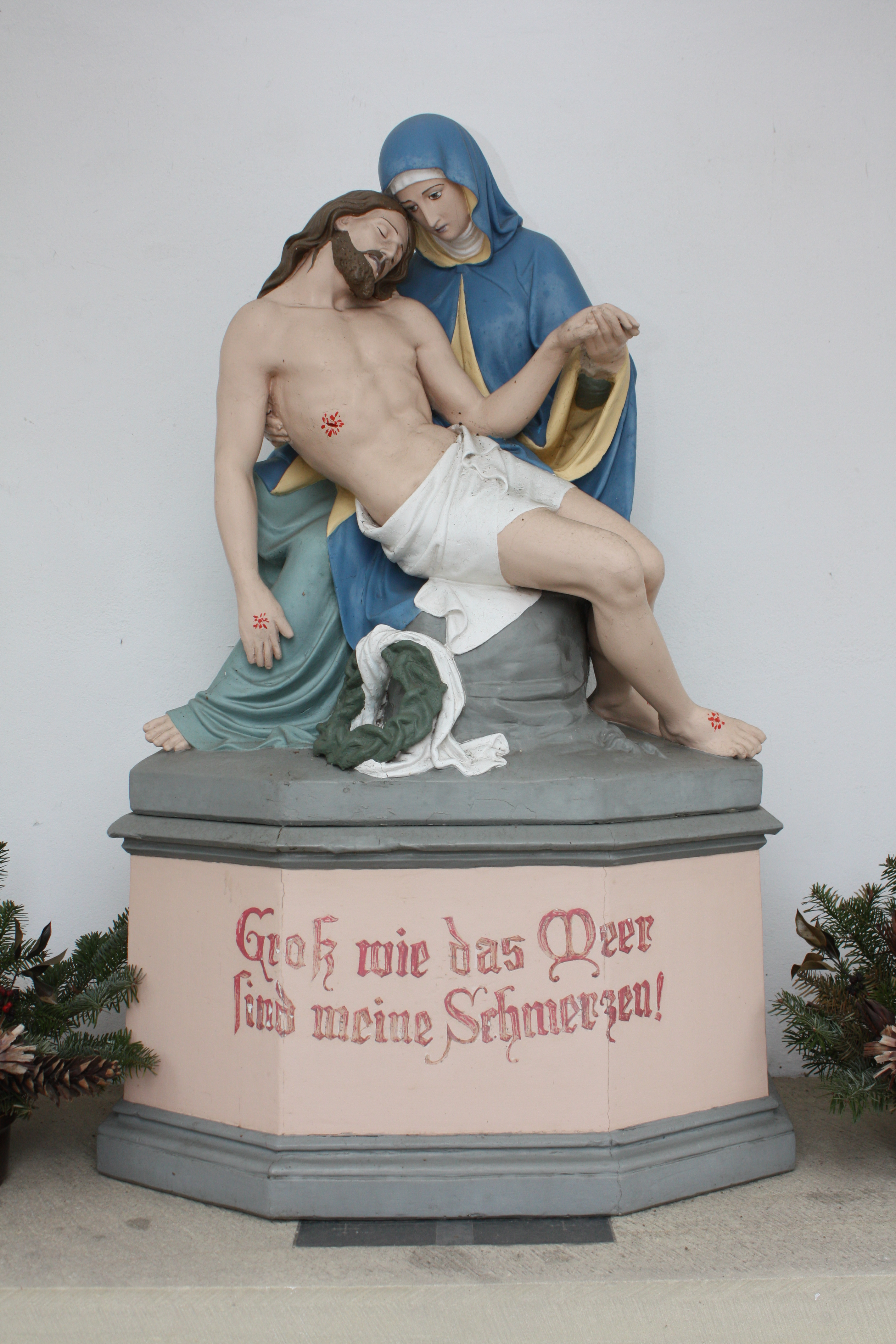 Pieta-Kapelle in Ostbevern